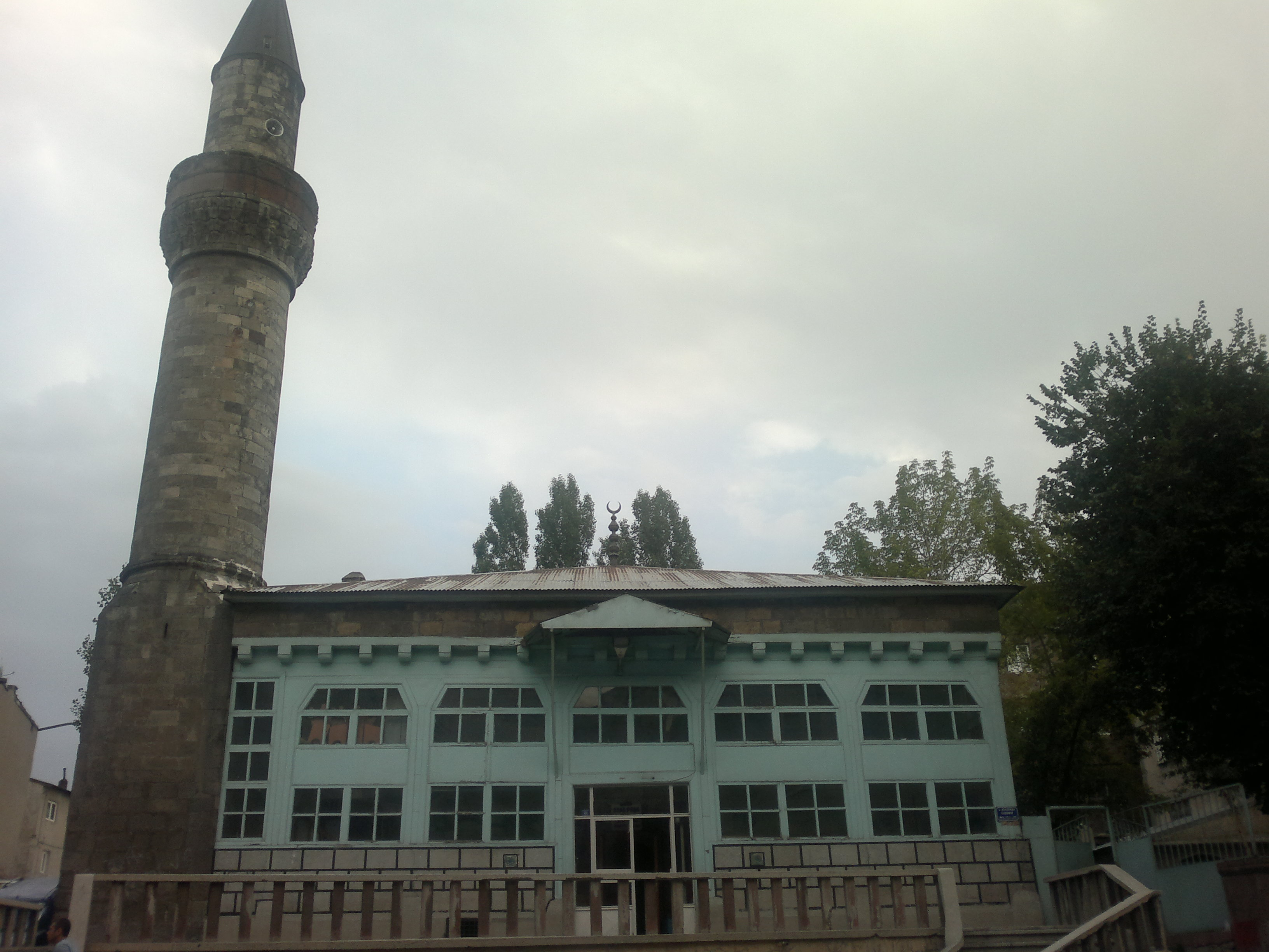 Erzurum Ayazpaşa Camii